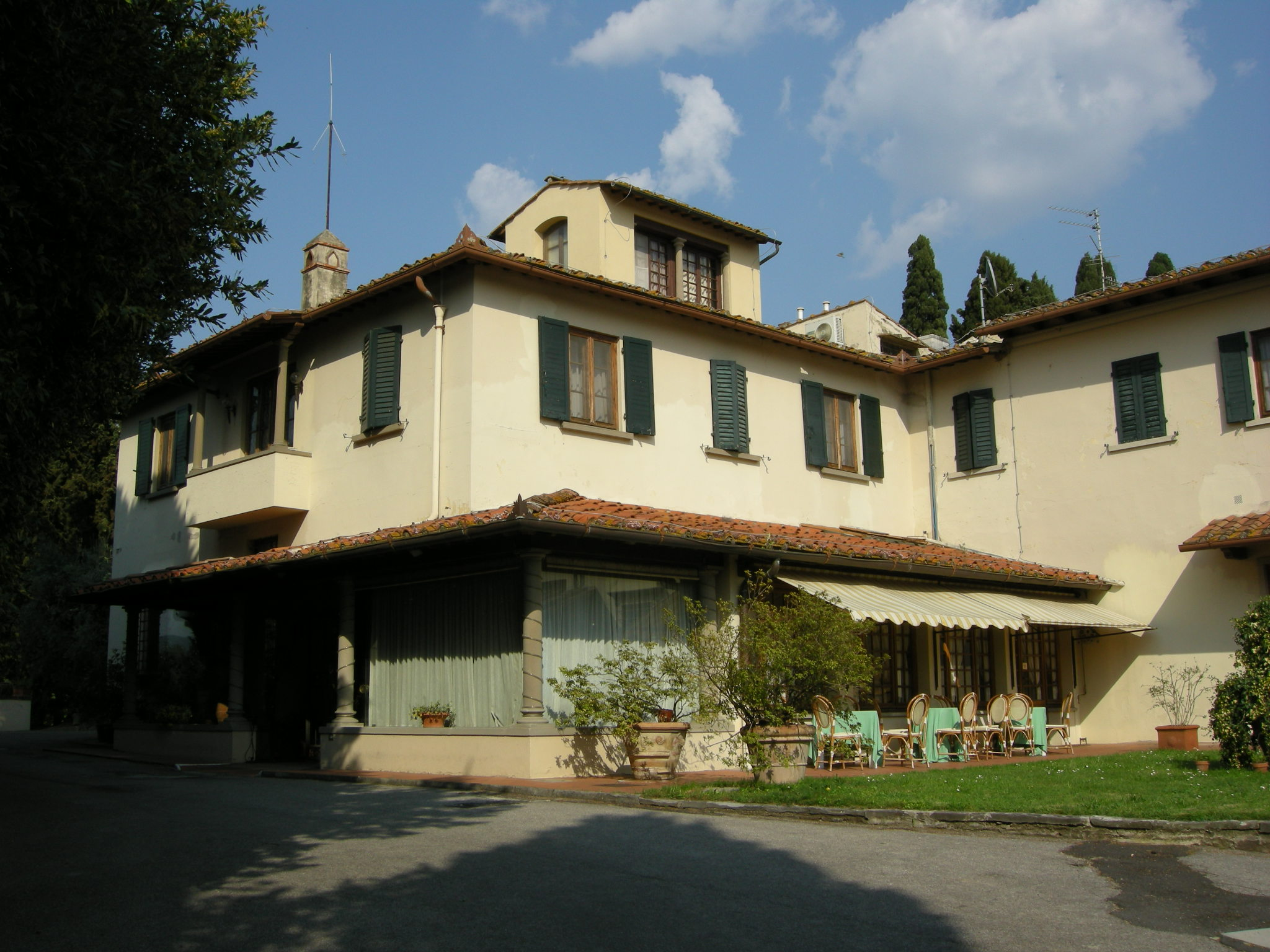 Villa Le Rondini